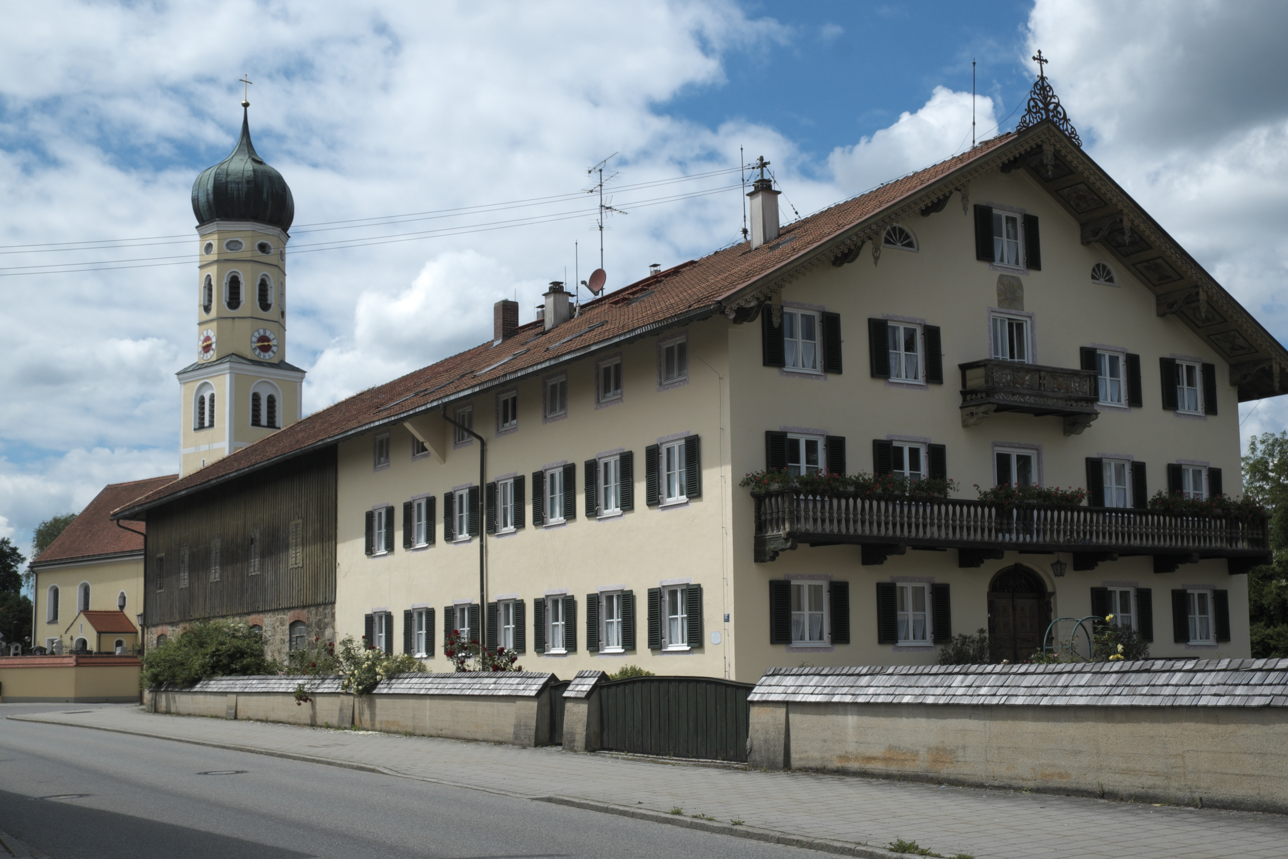 Bauernhaus Beim Lindmaier in Sauerlach im Landkreis München (Bayern/Deutschland)